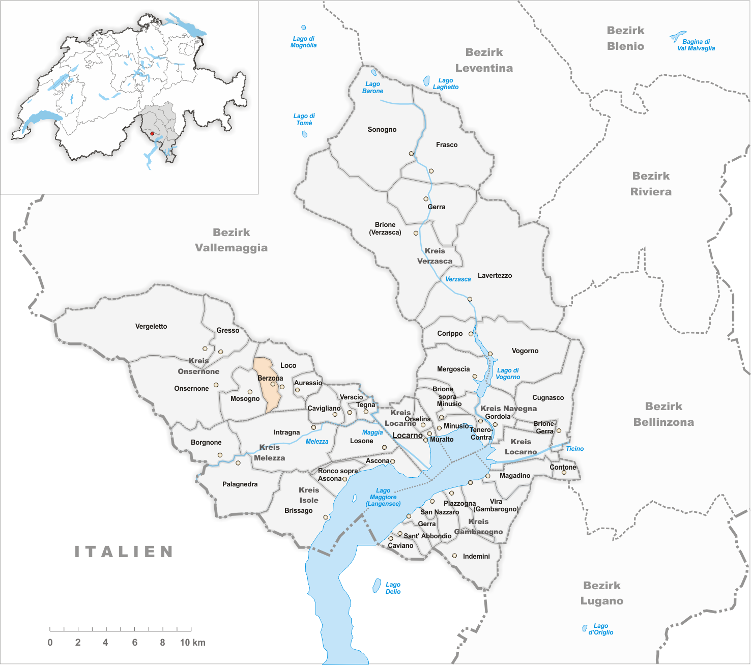 Municipality Berzona